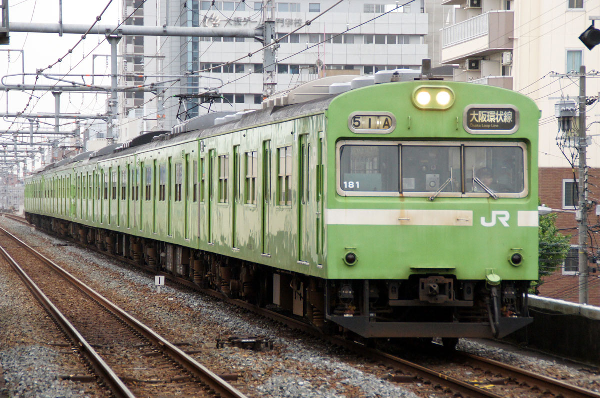 JR西日本103系（大阪環状線）